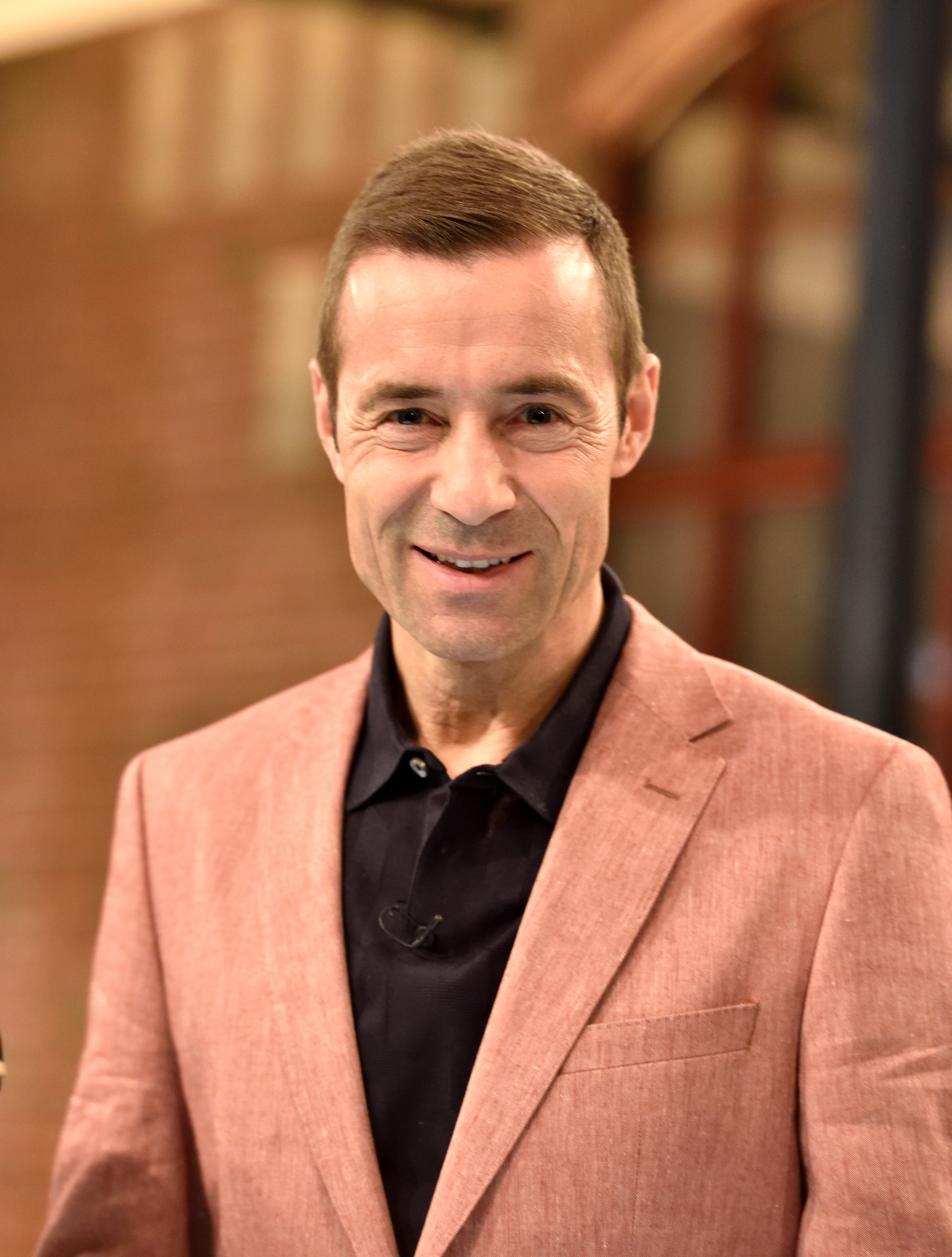 Kai Pflaume beim Fototermin zur Show Wer bietet mehr? im Auswandermuseum Hamburg